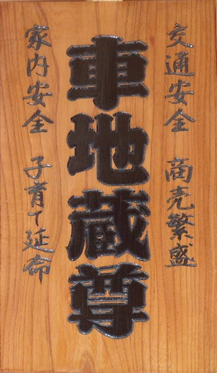 宮城県仙台市宮城野区の車町延命地蔵尊の扁額